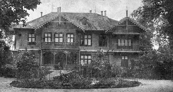 Двір Санґушків на Климівці, передмісті Заслава.